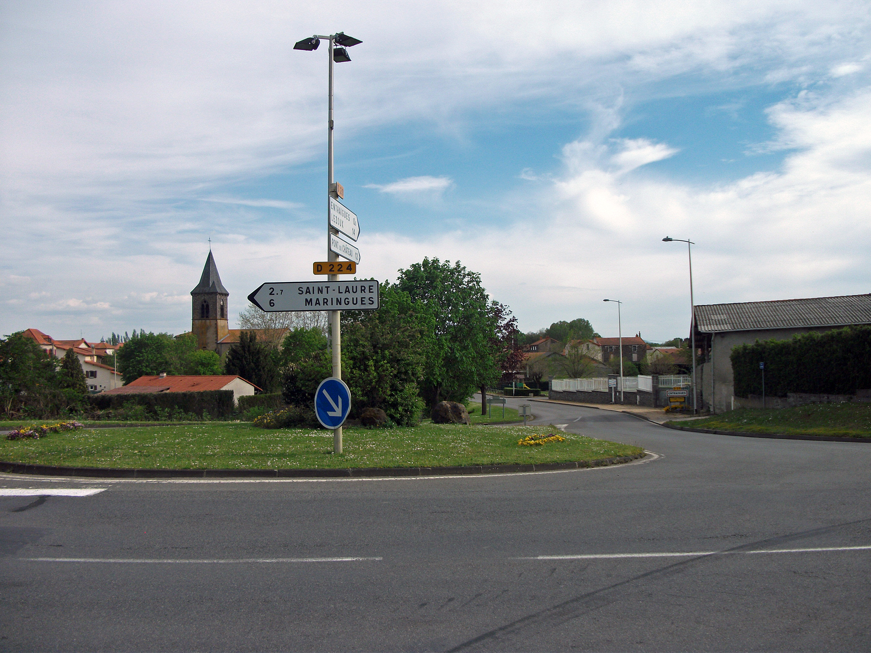 Carrefour entre les routes départementales 84 et 224 à Entraigues (Puy-de-Dôme) [10802]